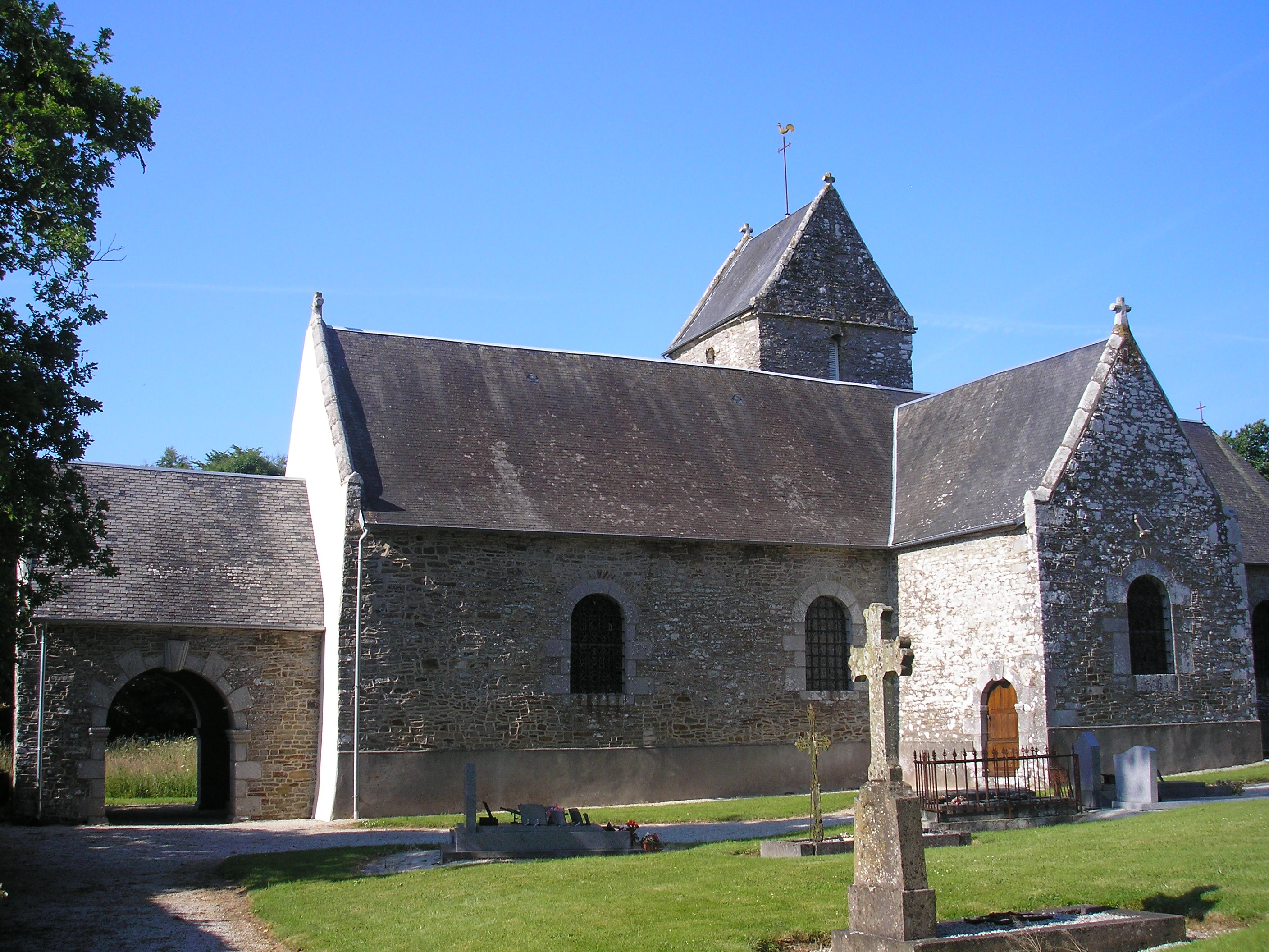 Équilly (Normandie, France). L'église Sainte-Anne.